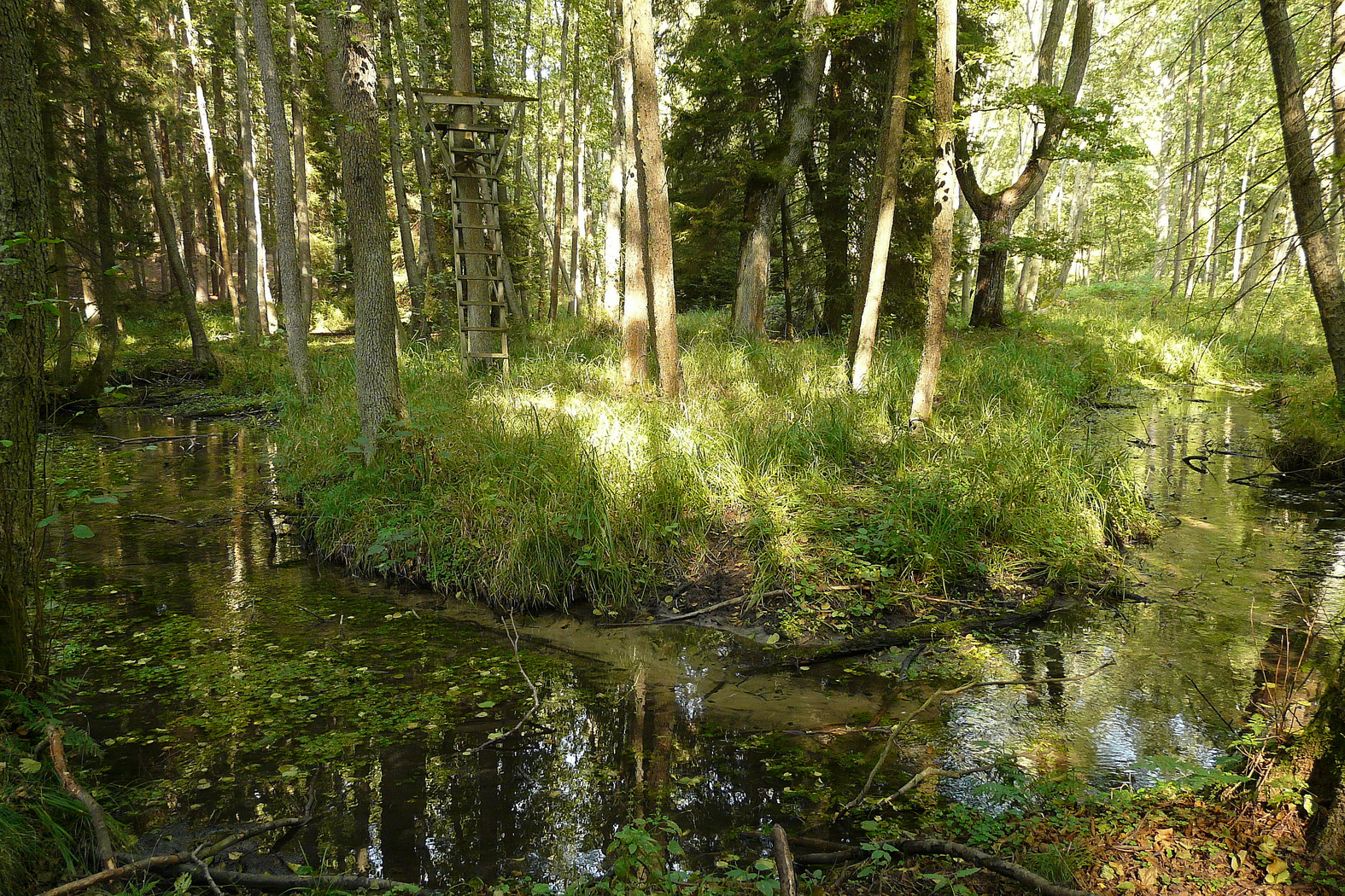 Meandrující Rokytka v NPP Rečkov